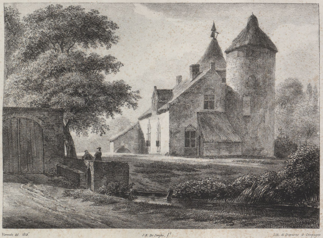 Hofstede De Torreelen, Vinkem (1816)